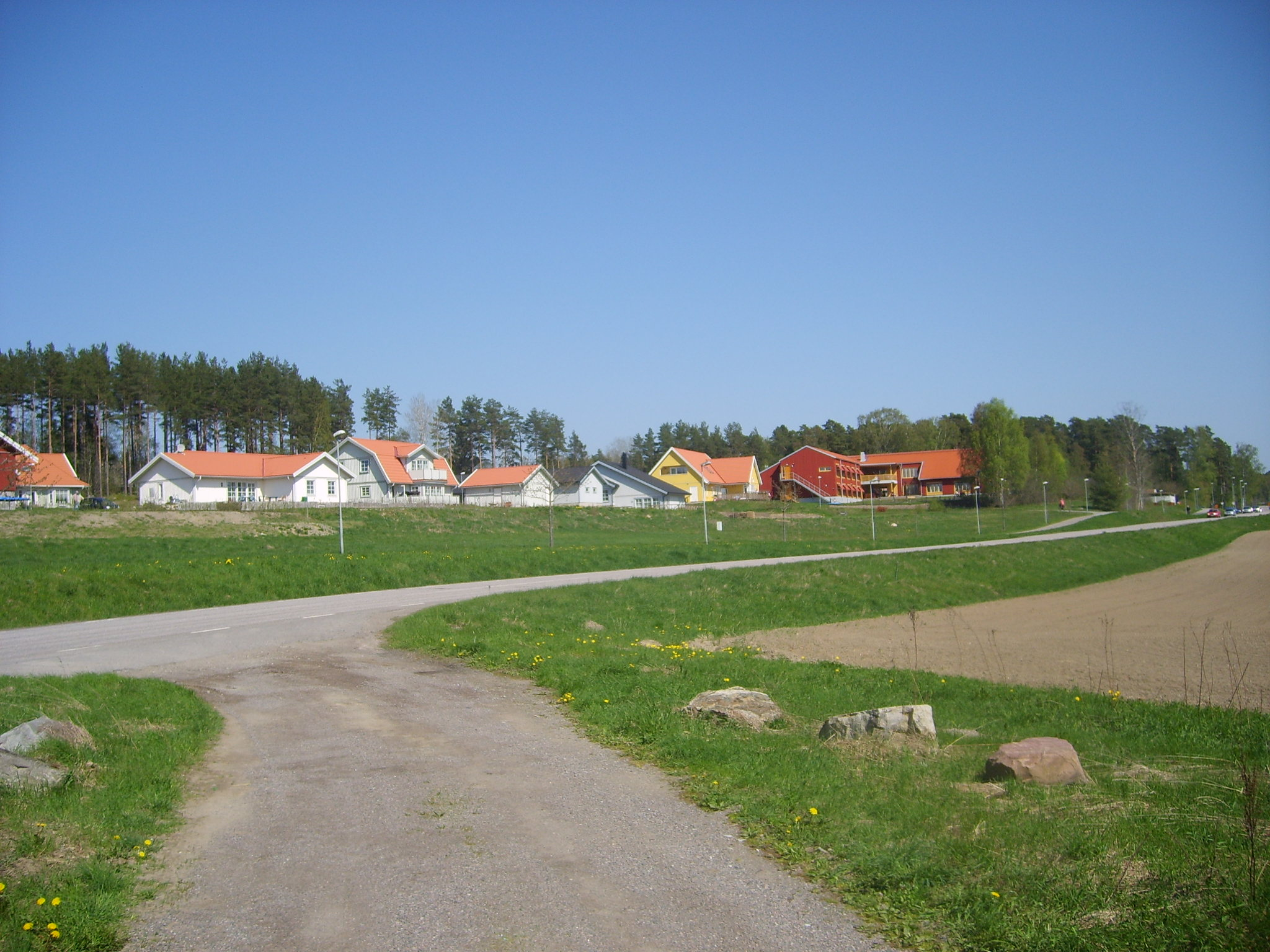 Residential houses in Ekeby in Sweden, an urban area (tätort) outside Södertälje.